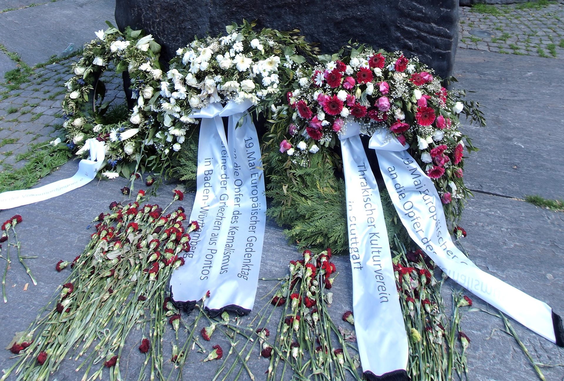 Kränze nach dem Gedenktag für die Opfer des Kemalismus ausgelegt von Vereine der Griechen aus Pontos Griechenverfolgungen im Osmanischen Reich 1914–1923 Thrakischer Kulturverein Thrakien-Pogrom 1934